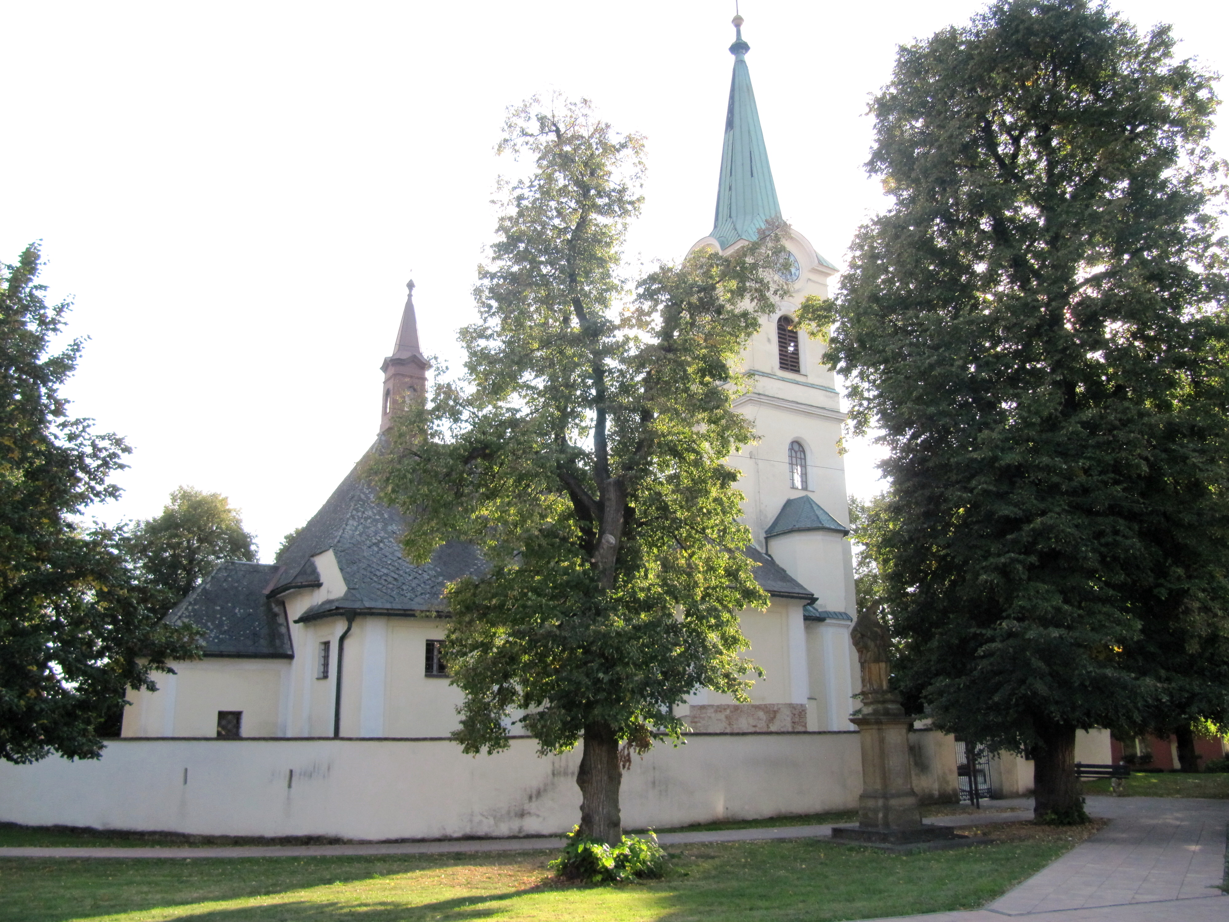 Kostel sv. Jakuba Staršího (Břest), náves, Břest